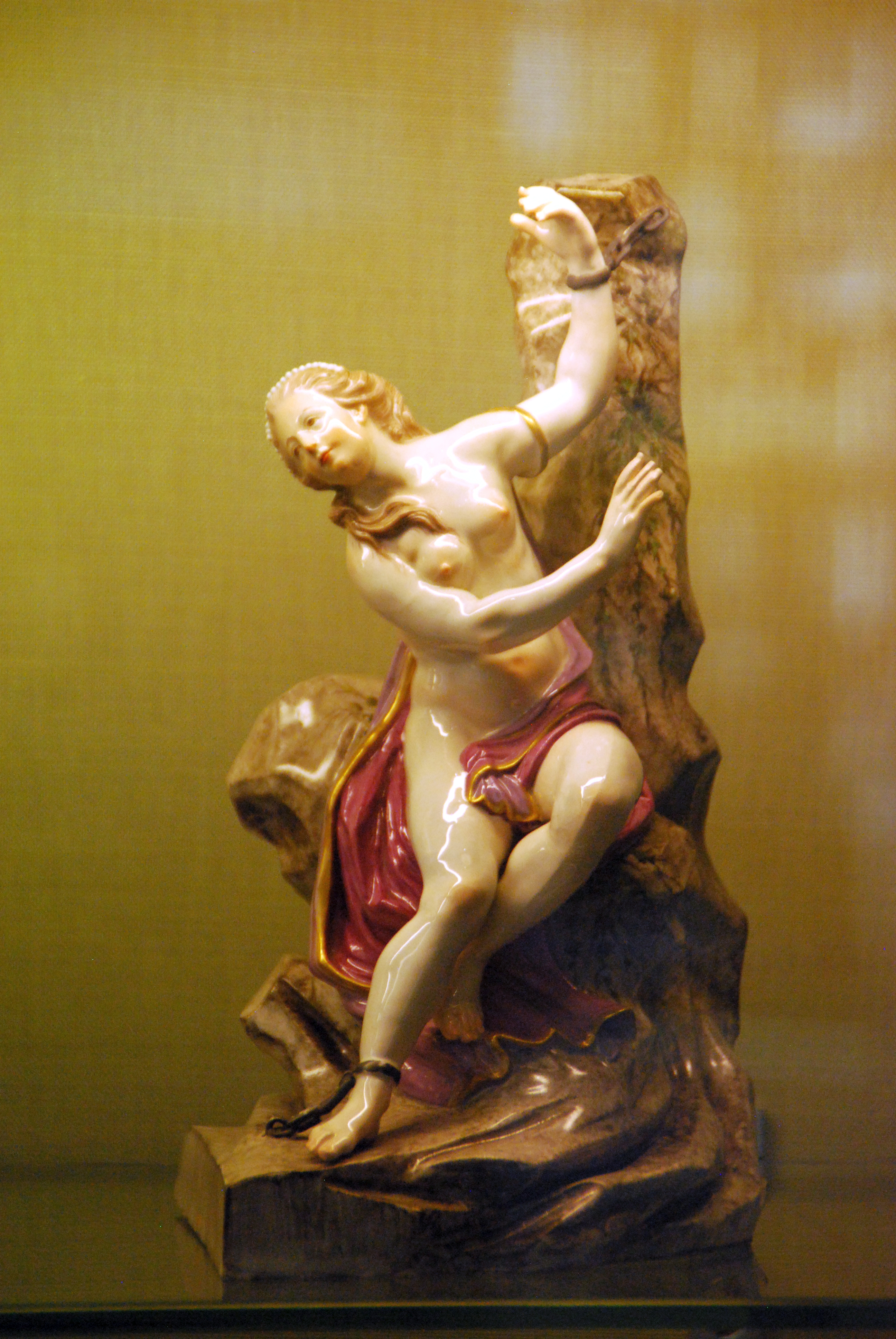 Andromeda am Felsen; modelliert von Jean Desoche nach einem Kupferstich von Laurent Cars das wiederum auf einem Gemälde von François Lemoyne basierte. Das abgebildete Exemplar befindet sich heute im Museum August Kestner in Hannover.